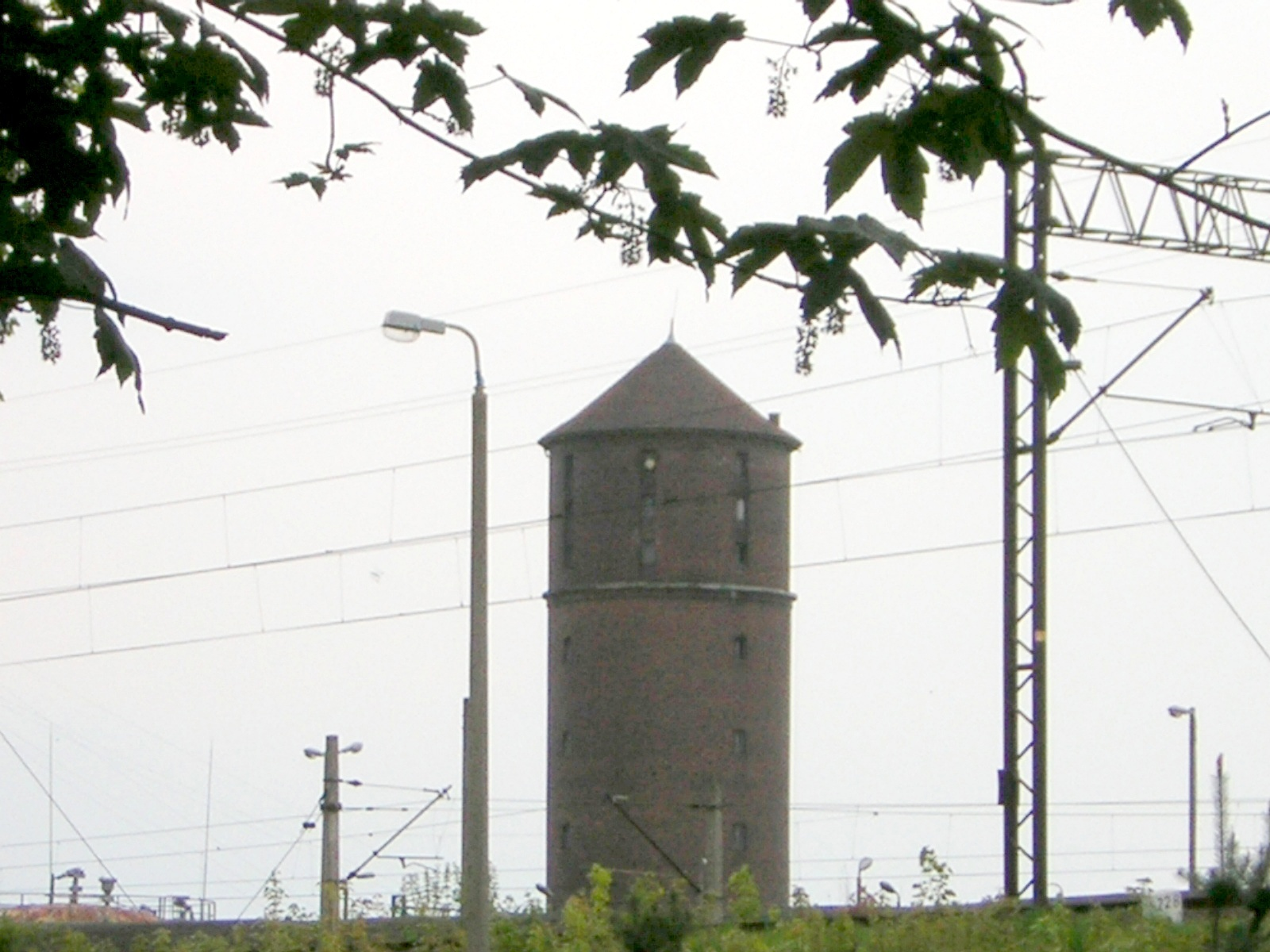 Iława - wieża ciśnień przy ul. Wojska Polskiego (na terenie ZNTK) z 1942 roku. 12.1998.